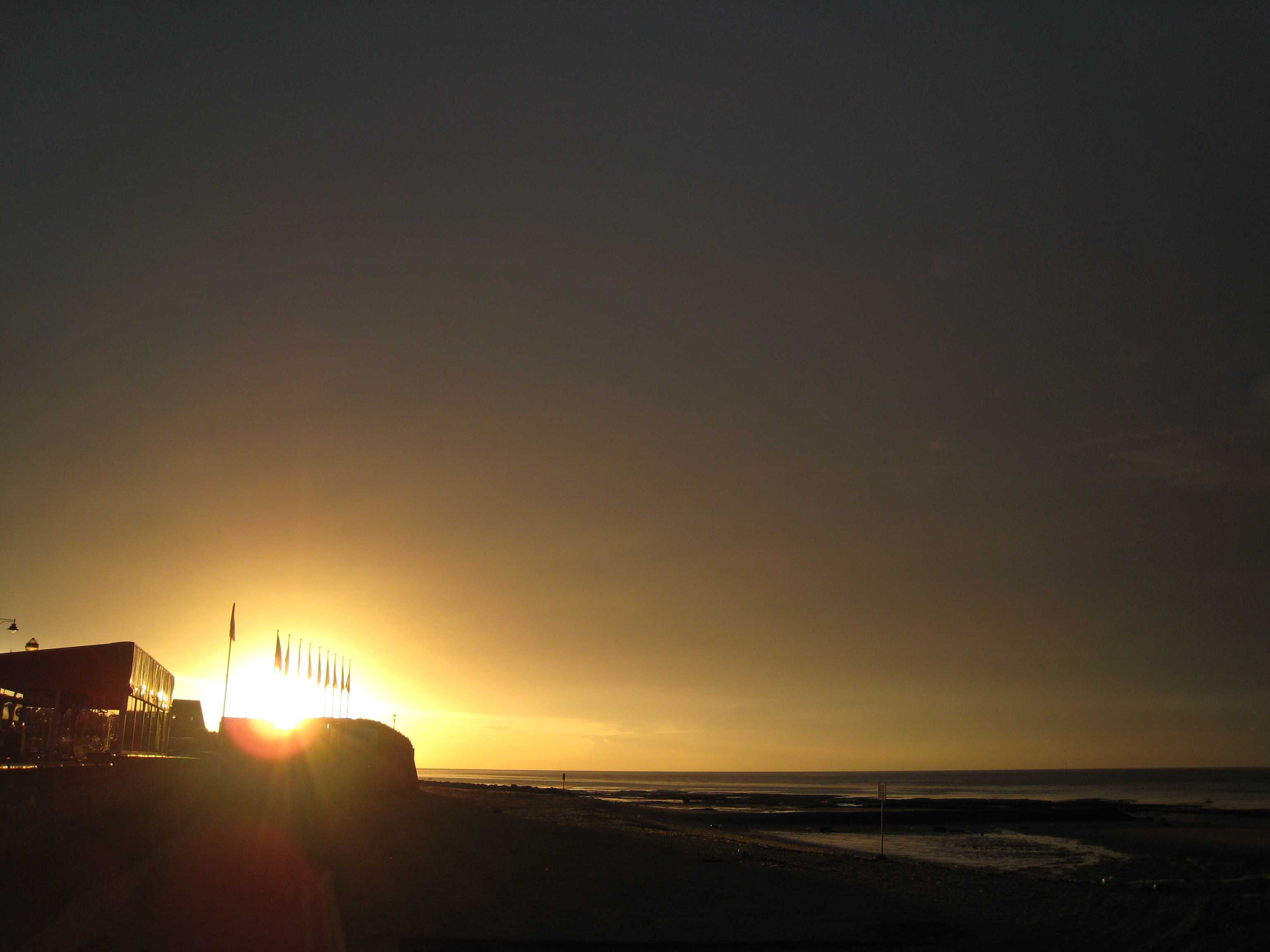 Coucher de soleil à Saint-Aubin sur Mer, Calvados, France